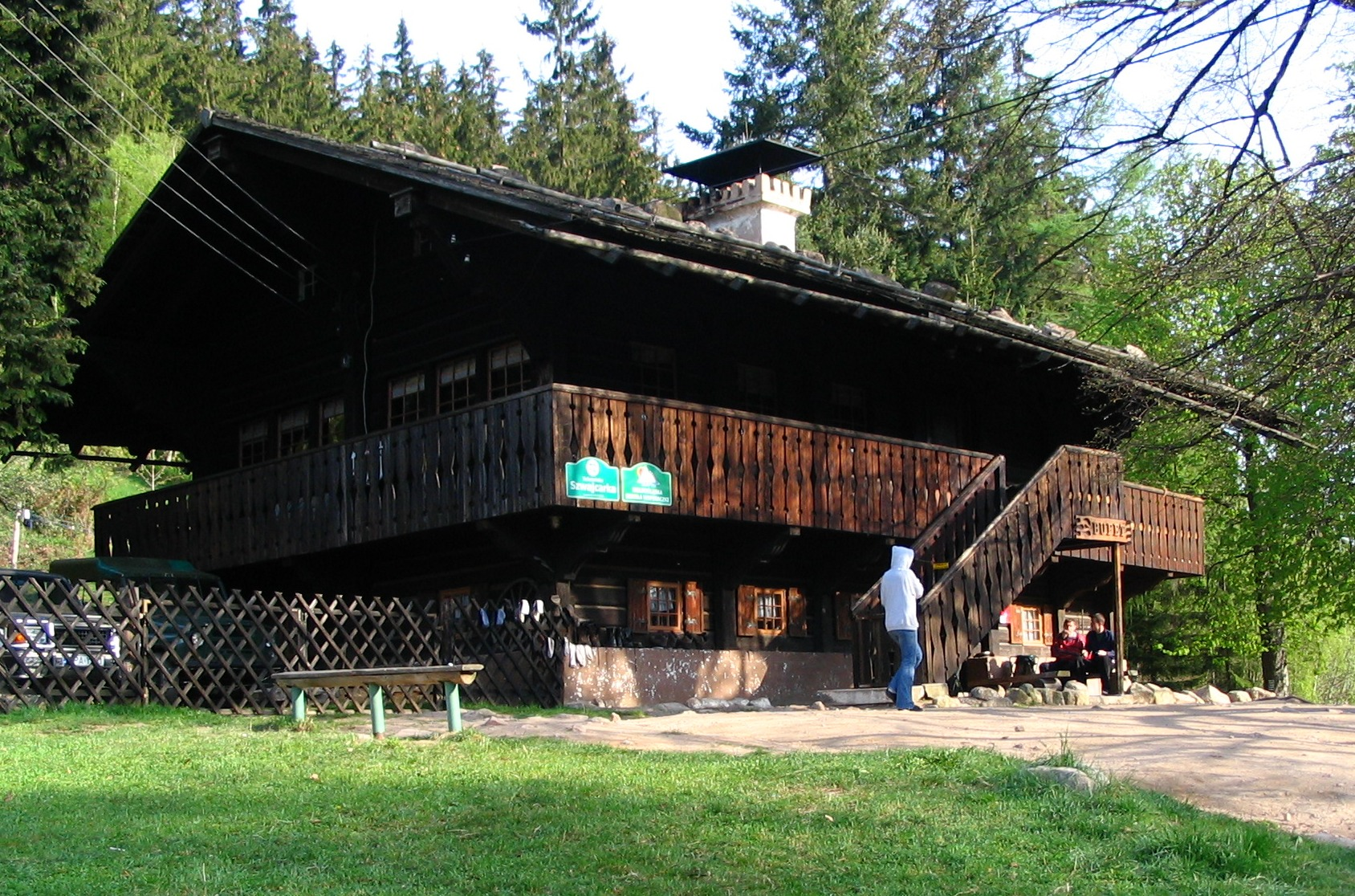 Szwajcarka, Rudawy Janowickie, Poland